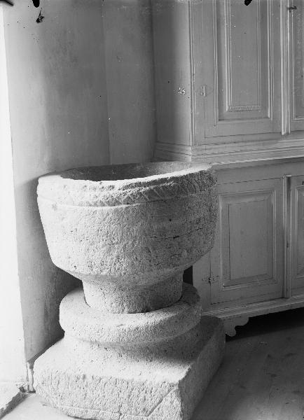 Dopfunt. Kategori: (04) DopfuntarDopfunt.